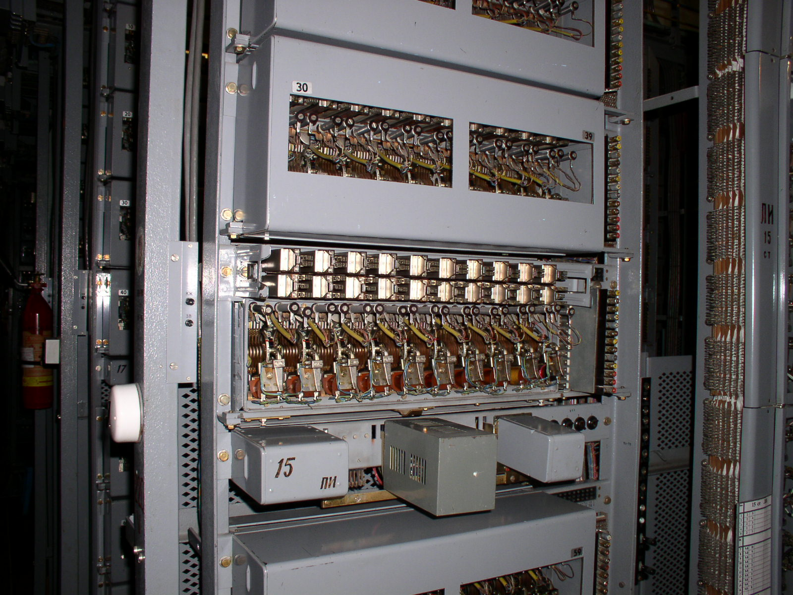 Статив предварительного искания (ПИ) АСТ-54ДШ г.Запорожье